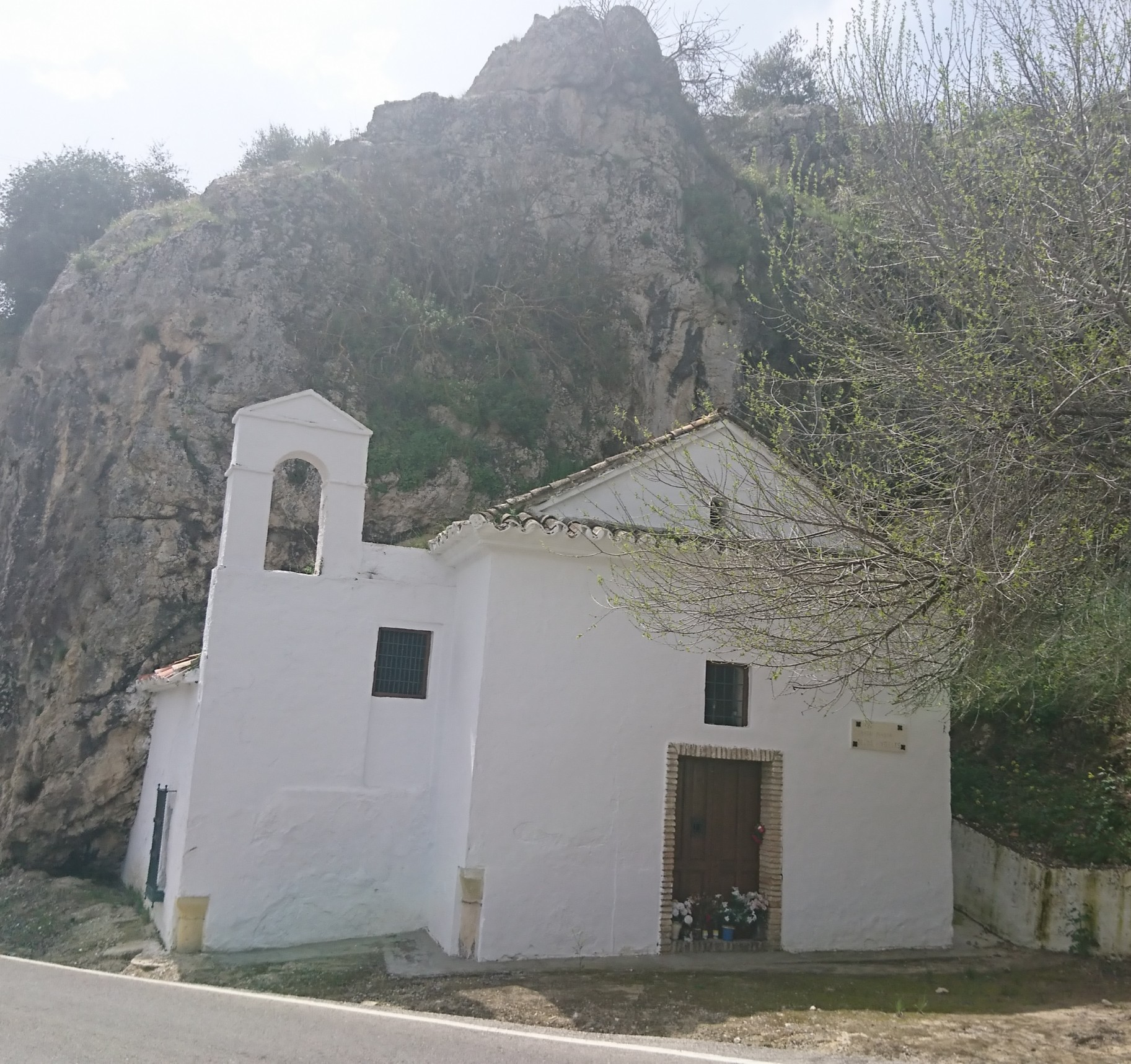 Ermita Nuestra Señora de los Ángeles, Baena